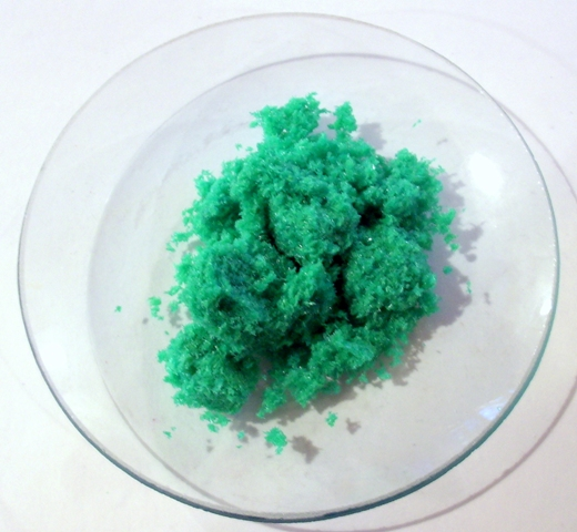 CuCl2